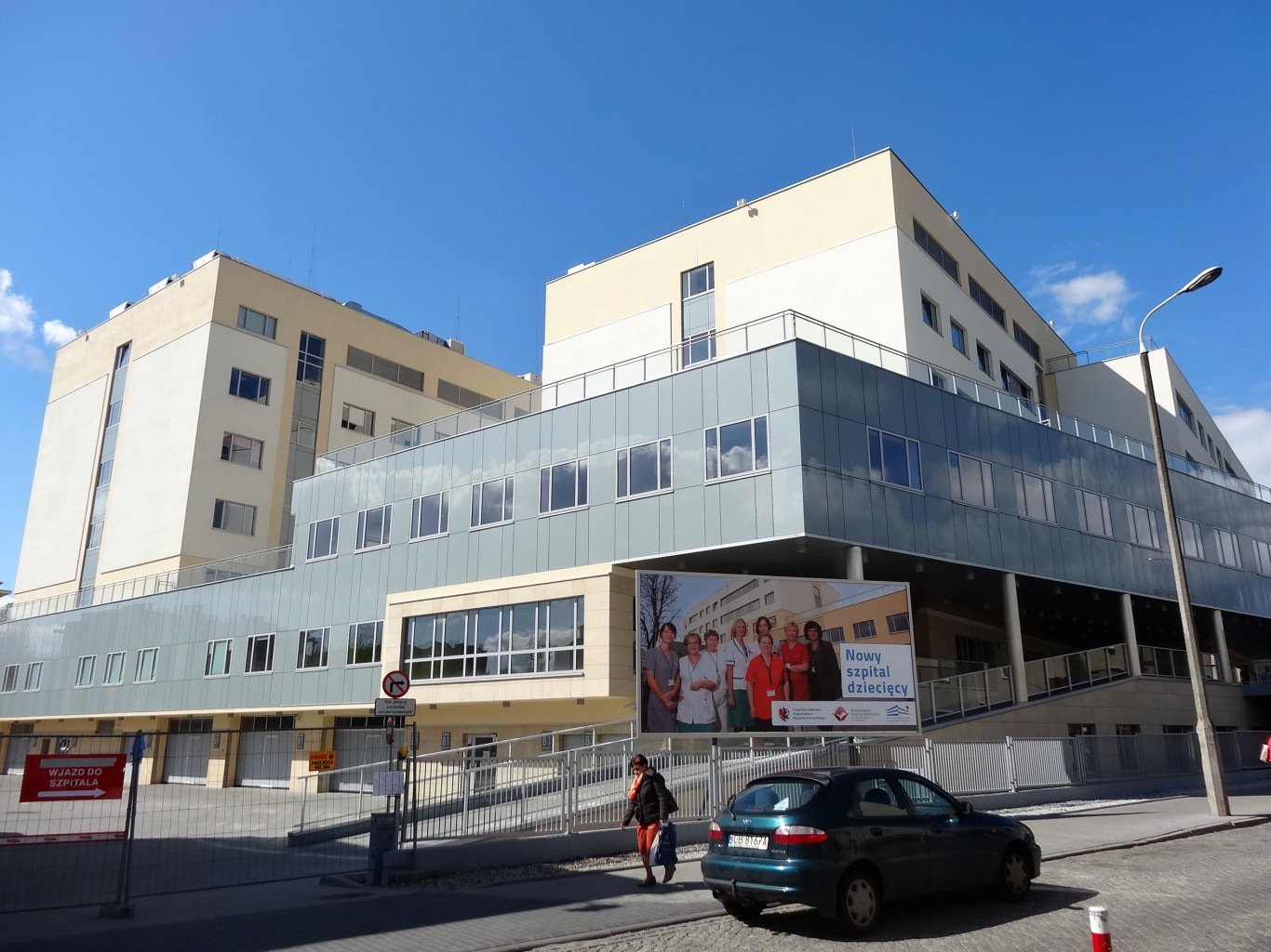 Wojewódzki Szpital Dziecięcy im. Józefa Brudzińskiego w Bydgoszczy przy ul. Jana Karola Chodkiewicza 44